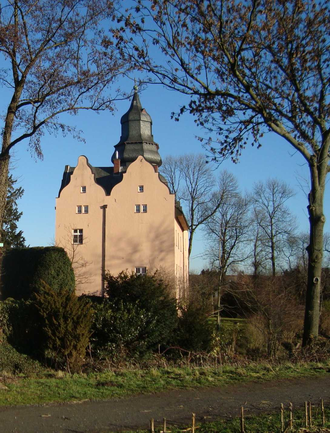 Dyckhof, Meerbusch-Büderich